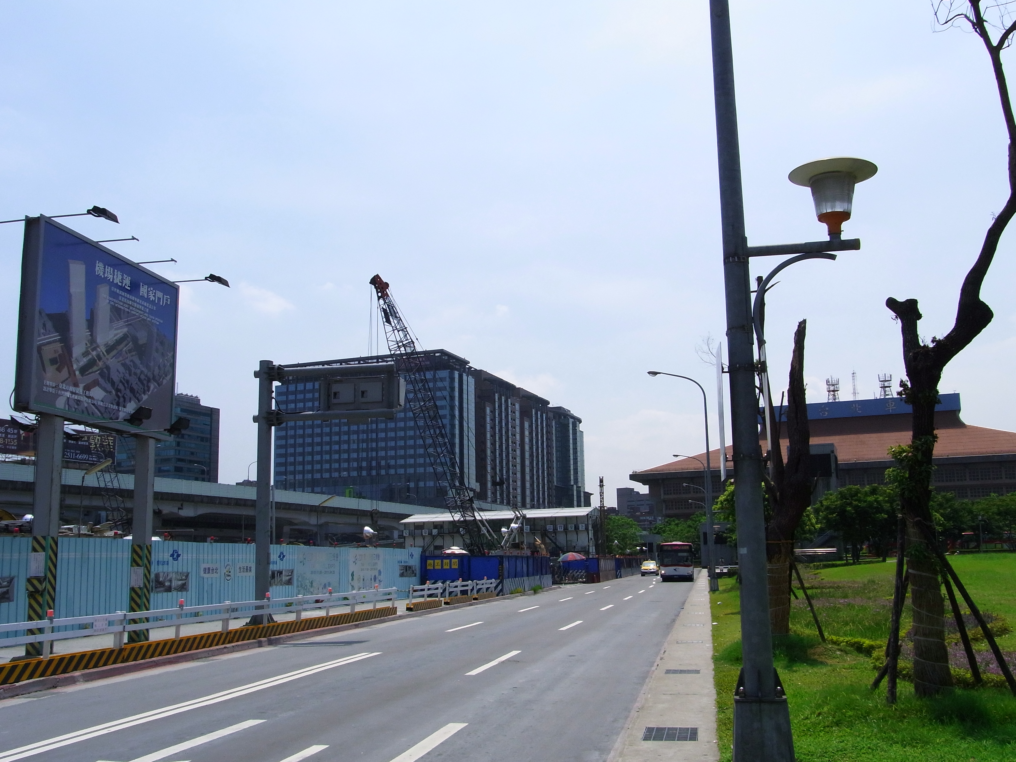 台北車站附近桃園機場捷運工地Bân-lâm-gú: Tâi-pak Tshia-tsām hù-kīn ê Thô-hn̂g Ki-tiûnn Tsia̍t-ūn kang-tē. 臺北車站附近的桃園機場捷運工地。